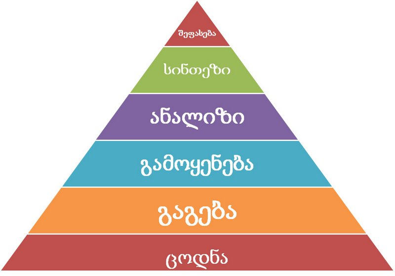 ბენჯამინ ბლუმის აზროვნების დონეების ტაქსონომია